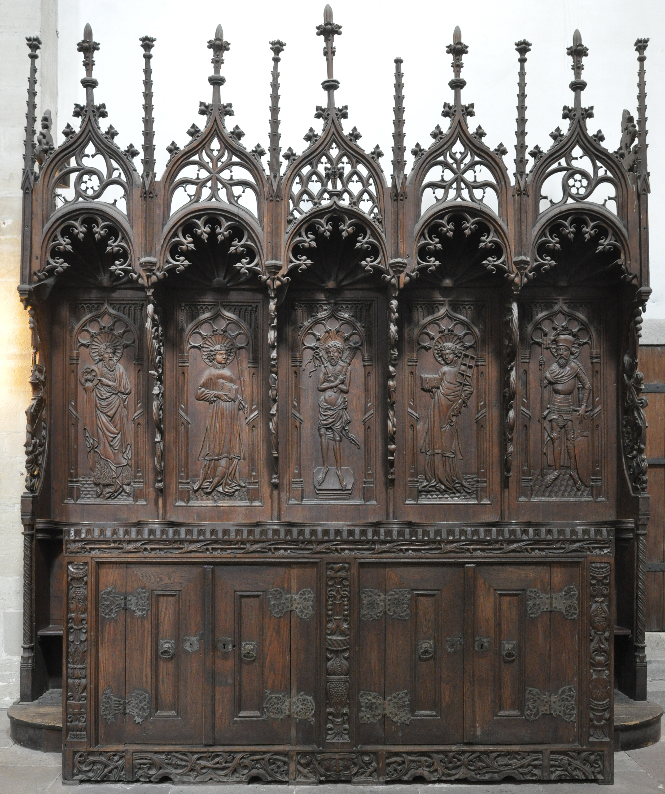 Fünfsitz an der Nordwand des Chores (Sanctuariums) Anfang des 15. Jahrhunderts (Pulte ca. 100 Jahre jünger).